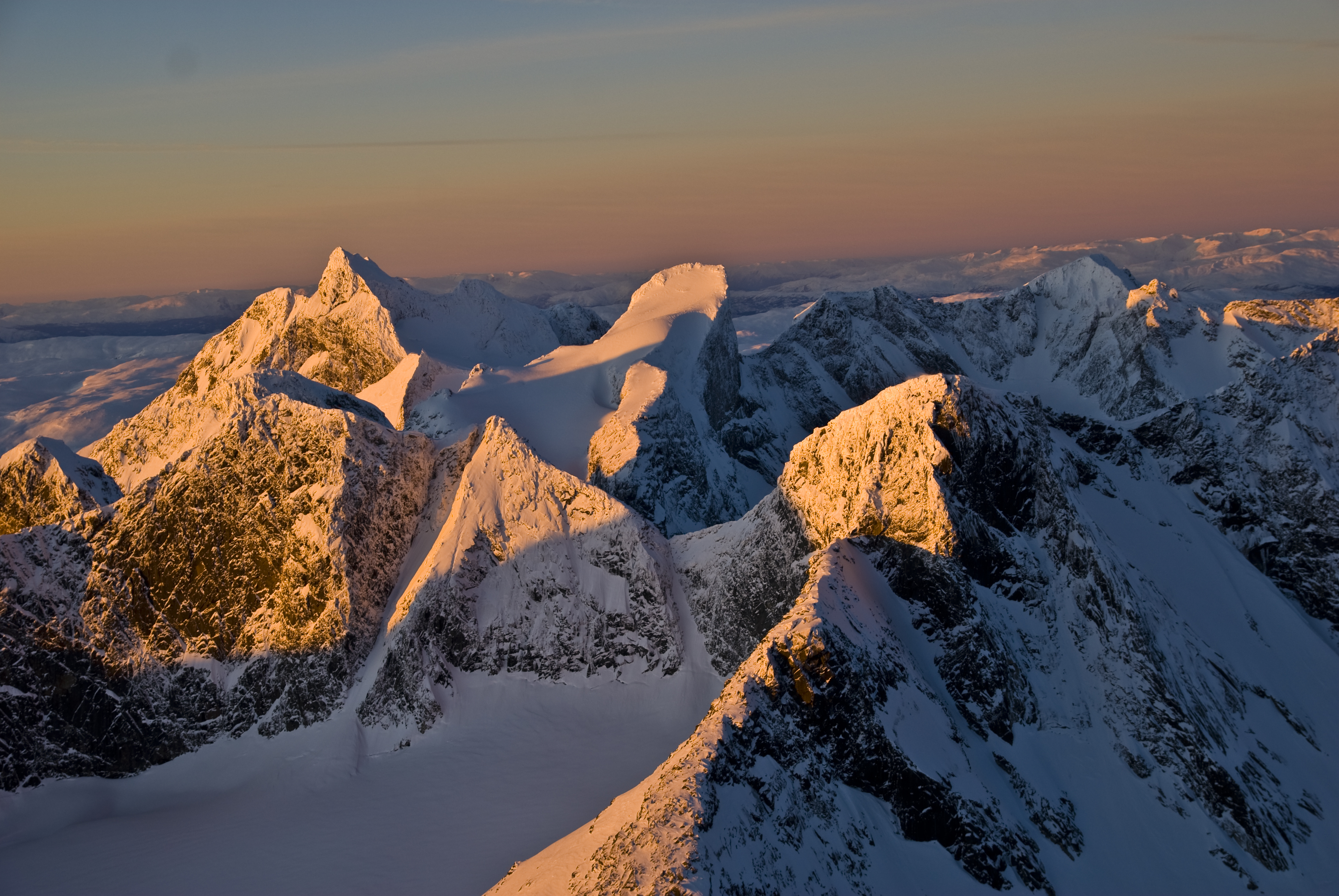 Hurrungane peaks seen from Storen.